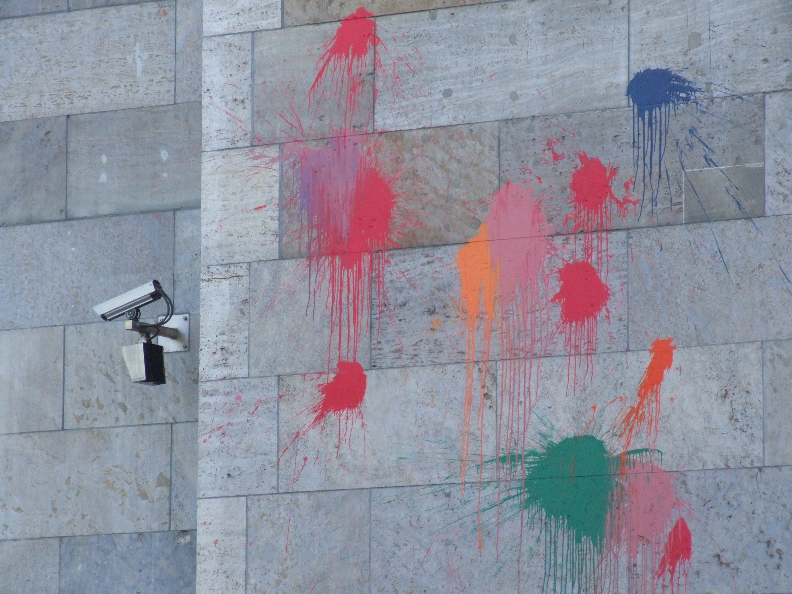 Finanzministerium nach der EuroMayDay-Demo am 1. Mai 2009